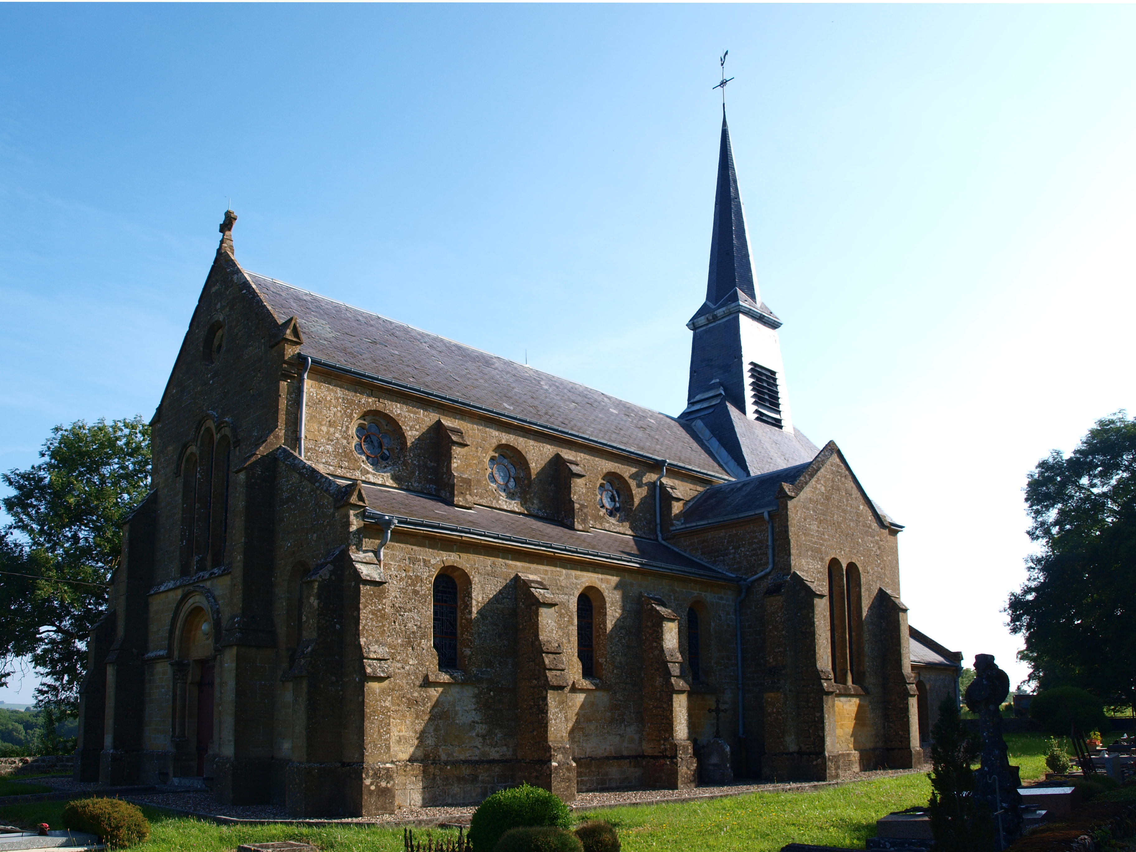 Oches (Ardennes, France) ; église